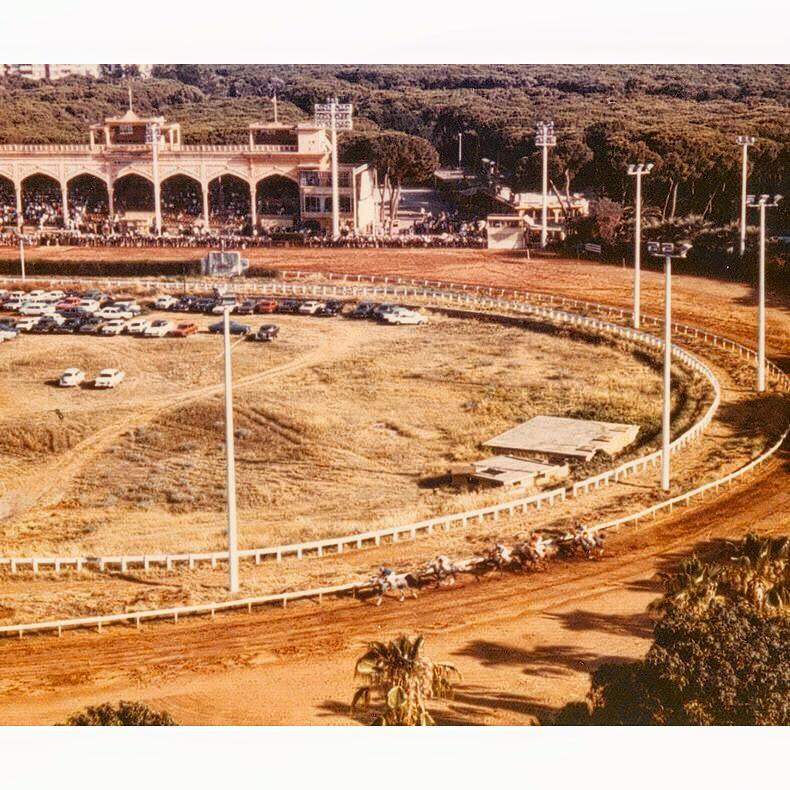 تبين الصورة ميدان سباق الخيل في بيروت عام ١٩٧٣